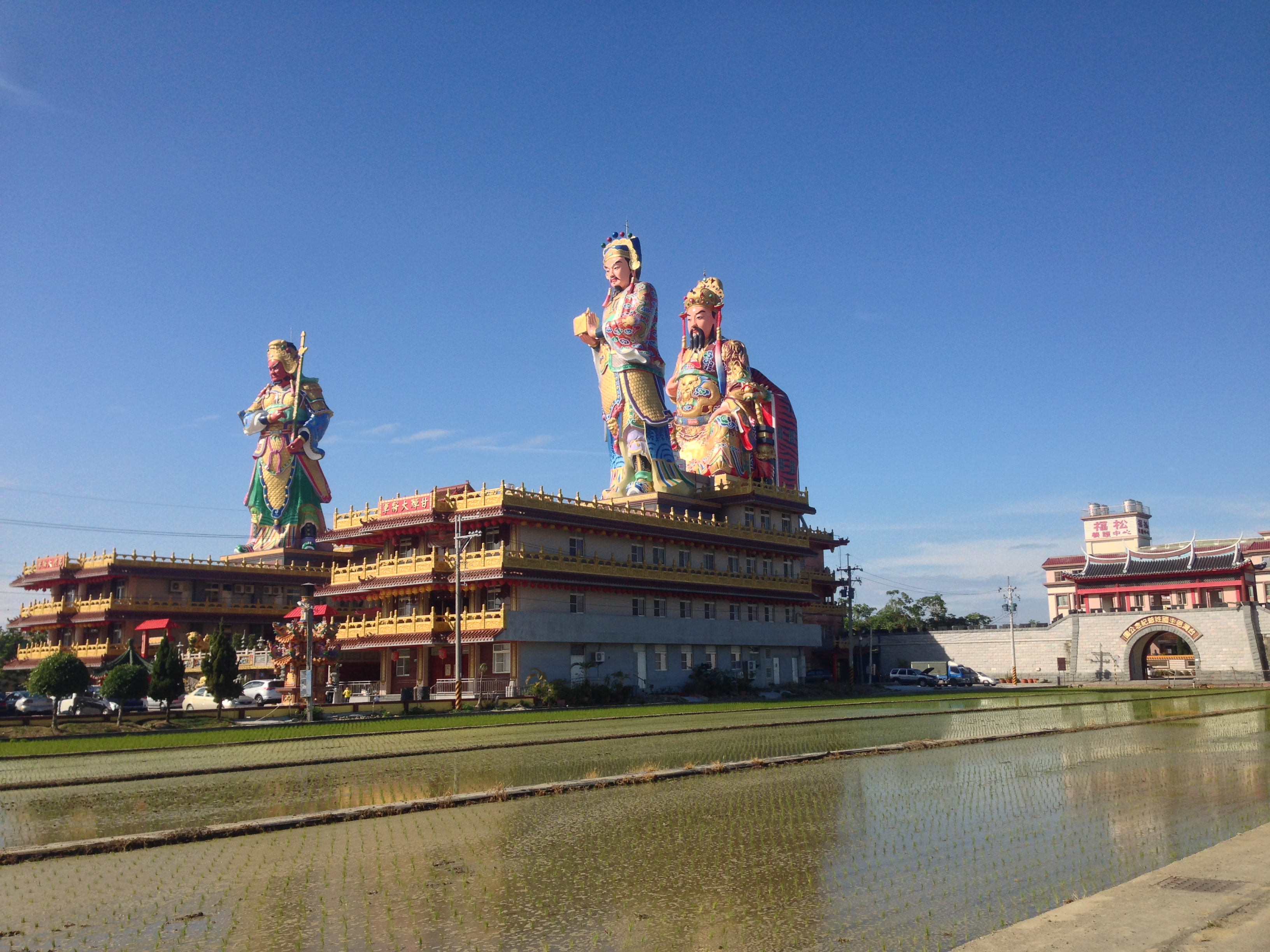 開元殿與鄭成功紀念公園門口